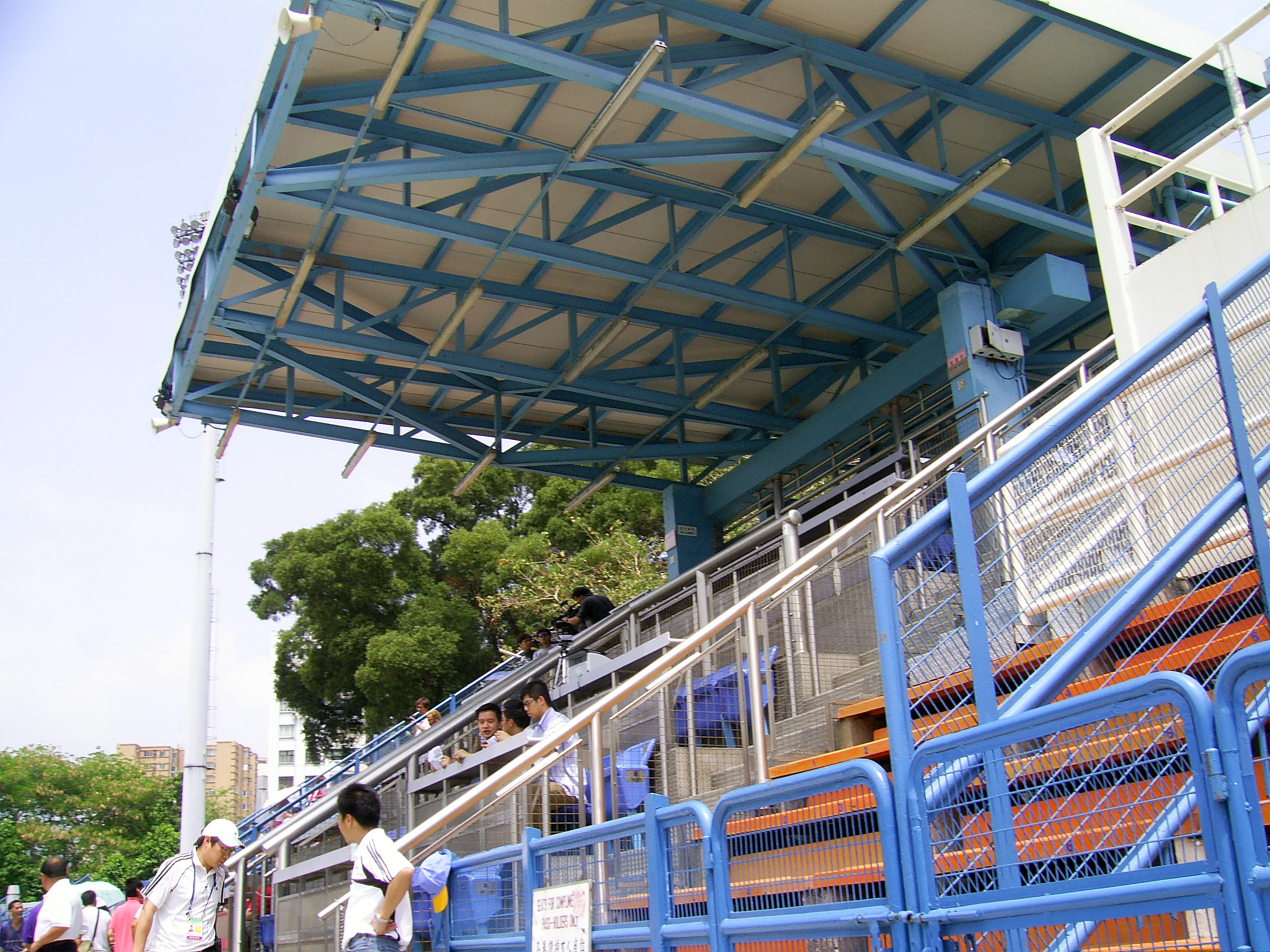 中文（香港）: 旺角大球場唯一有蓋的嘉賓席